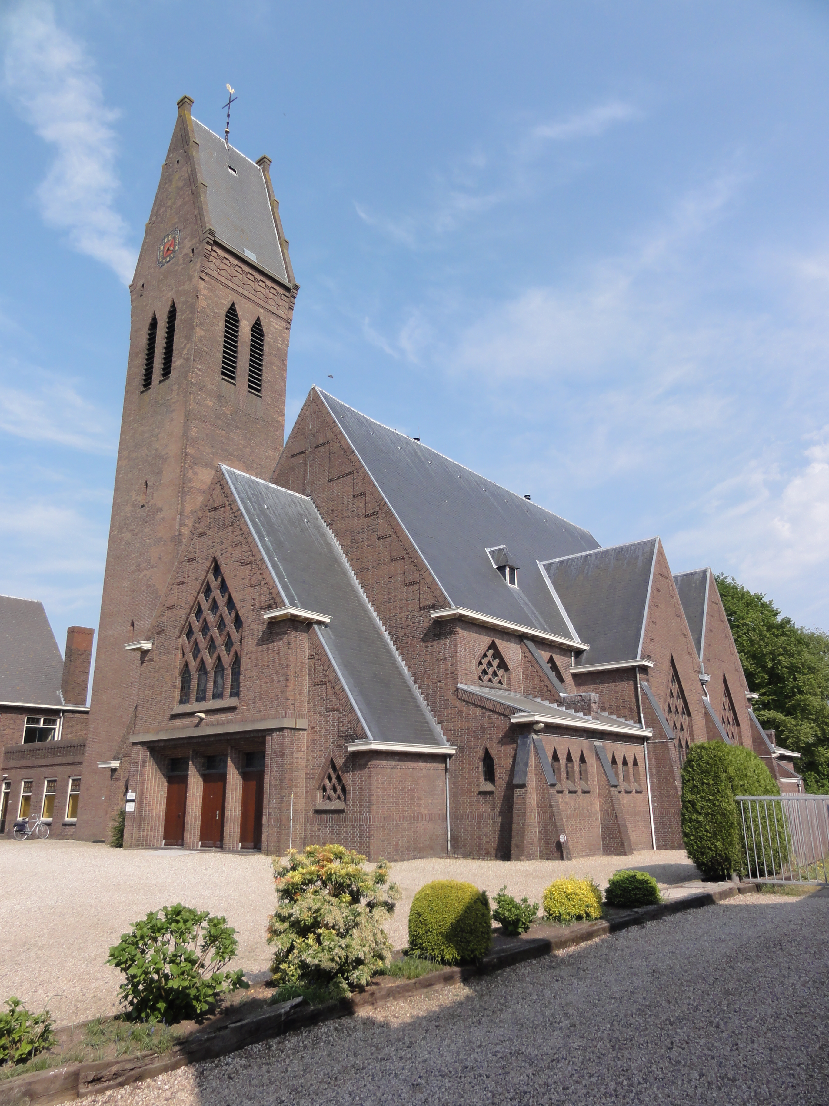 Oosterhout achterkant kerk 86″ N, 5° 49′ 30.12″ E